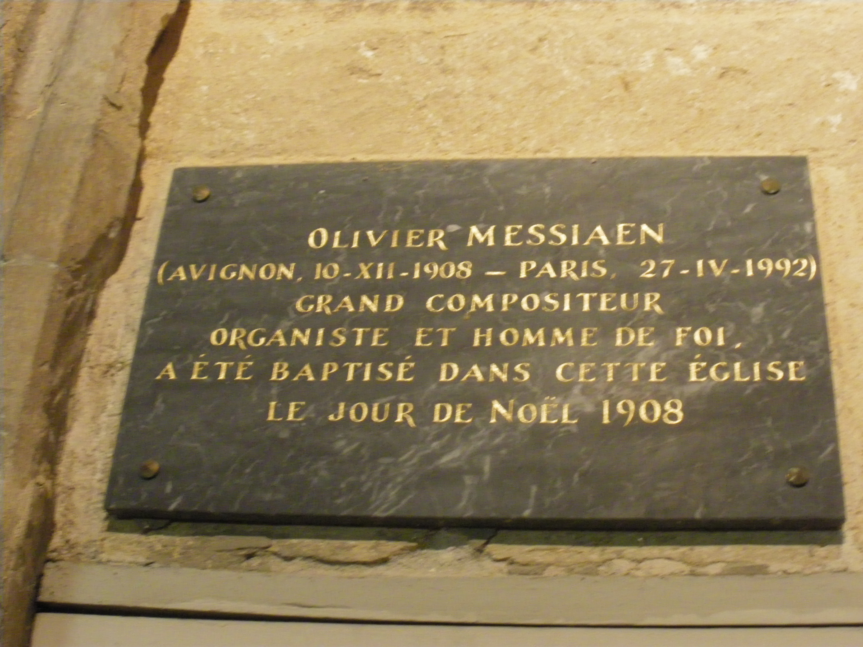 Plaque en hommage au compositeur Olivier Messian, baptisé à l'église Saint Didier, à Avignon le 25 décembre 1908